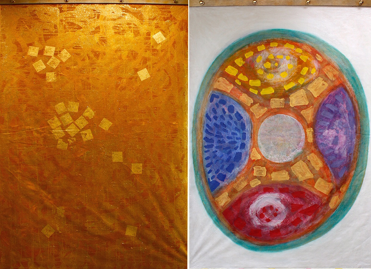 Oro de Lux/Eternal Creation, 2 zijdig beschilderd ongespannen doek, 220 x 150 cm, 2019